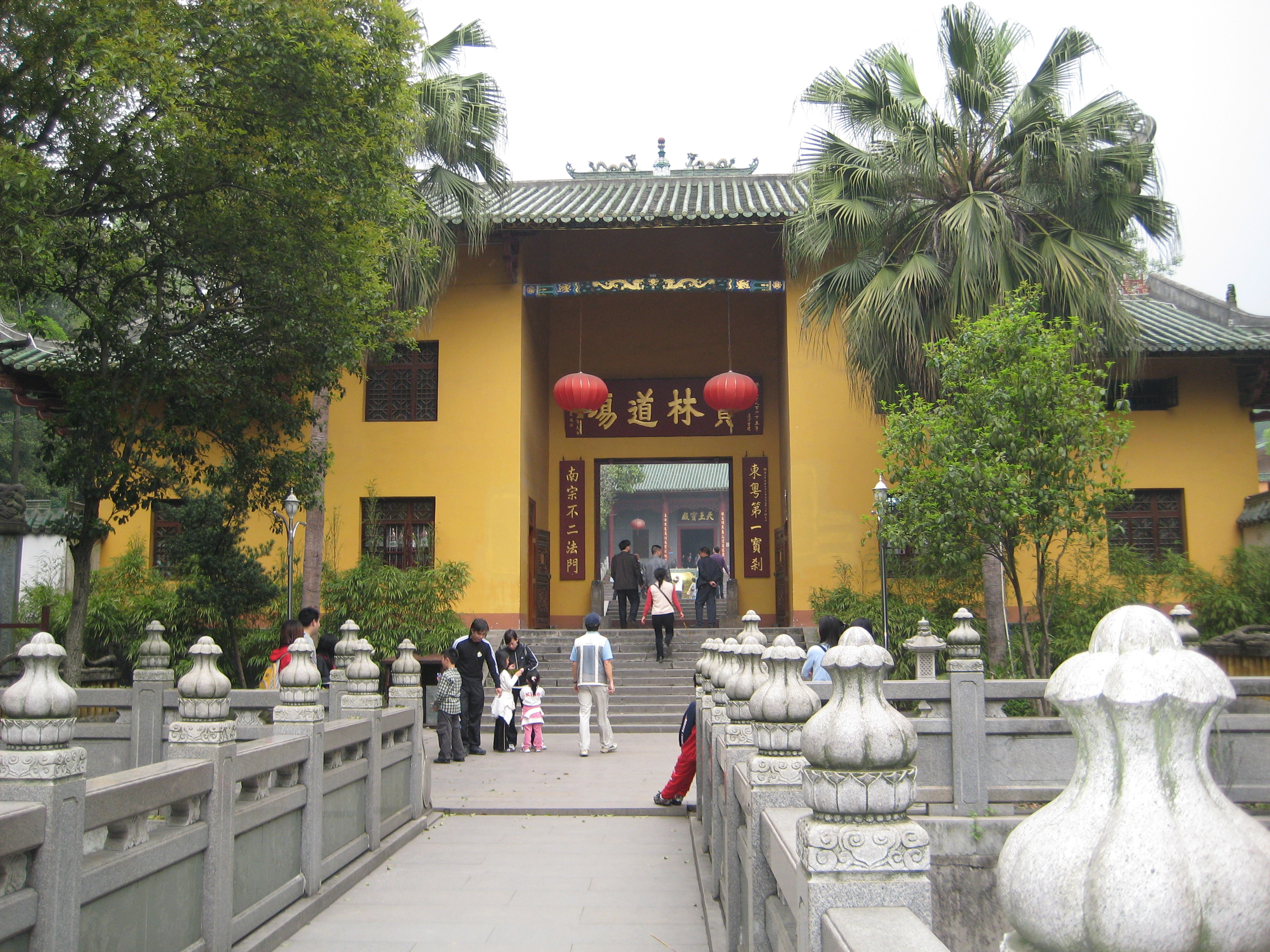 南华寺进口.JPG